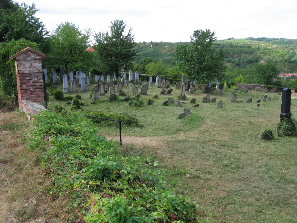 Jihozápadní okraj židovského hřbitova v Dolních Kounicích. The south-western corner of the Jewish cemetery in Dolní Kounice.